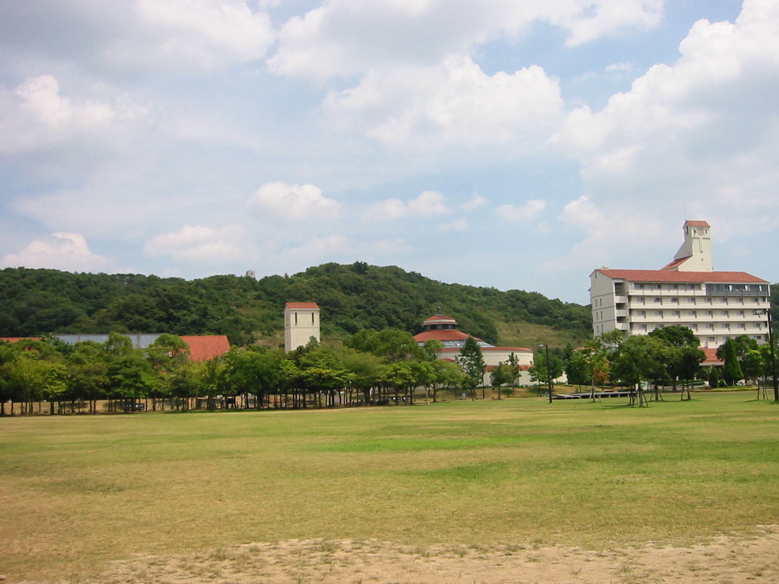 神戸、しあわせの村。